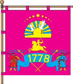 Прапор Підгородного